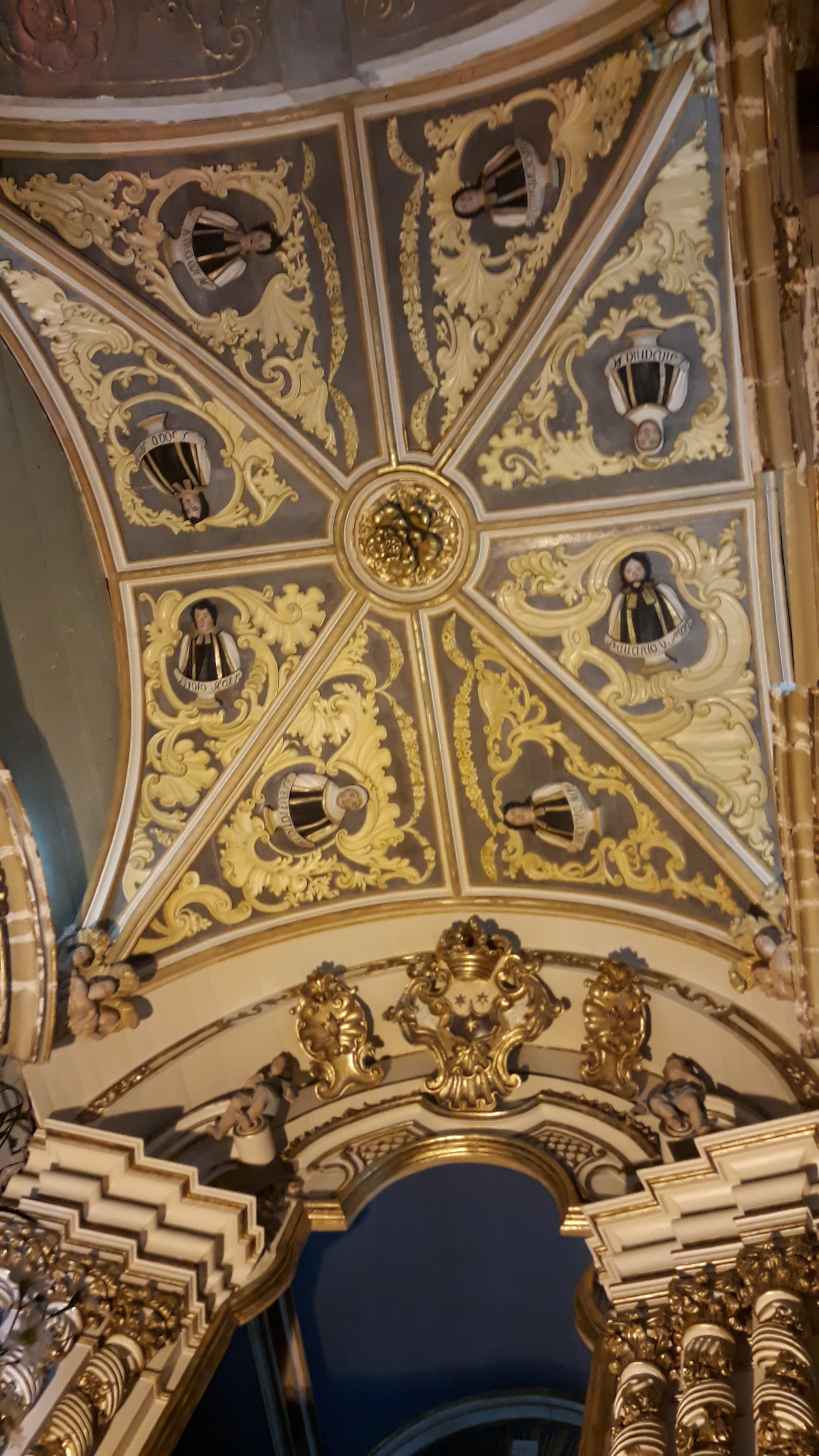 Teto do Altar-Mor da Capela da Igreja de Santa Teresa de Jesus da Ordem Terceira do Carmo, em João Pessoa, Anexo da Igreja de Nossa Senhora do Carmo, em João Pessoa, Paraíba